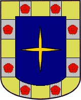 "En campo azur un lucero de oro y bordura de ocho puntos de oro y ocho de plata, cargados éstos últimos con una rosa encarnada cada uno".